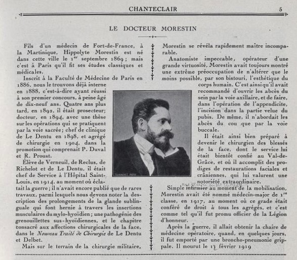 Chanteclair . - 1922. - 17e année Page